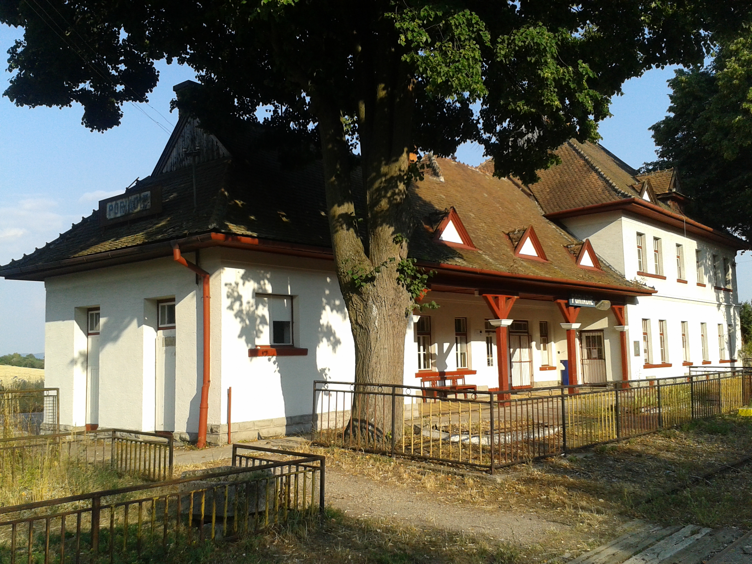 Železničná stanica Poriadie